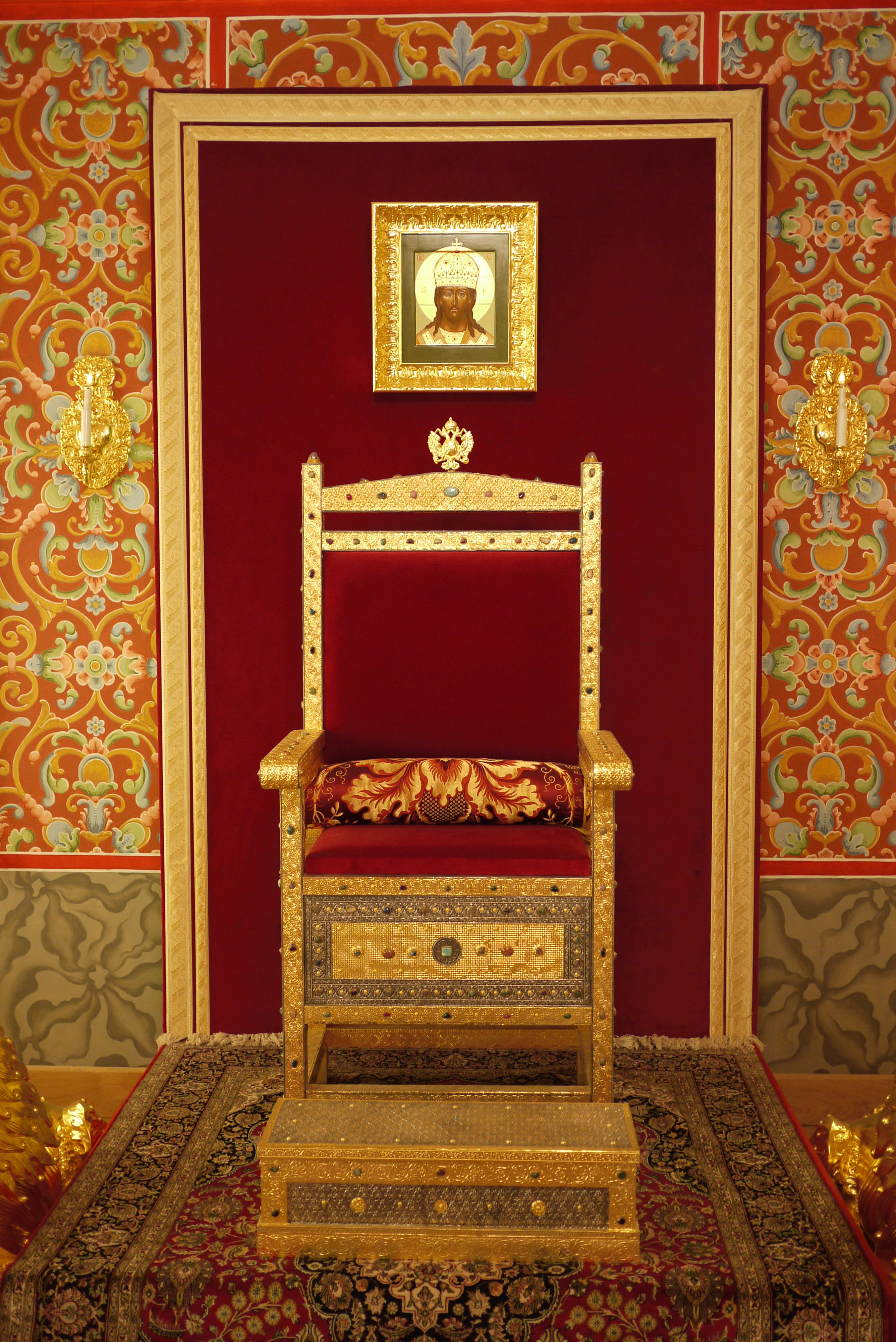 Трон в деревянном дворце, в Коломенском